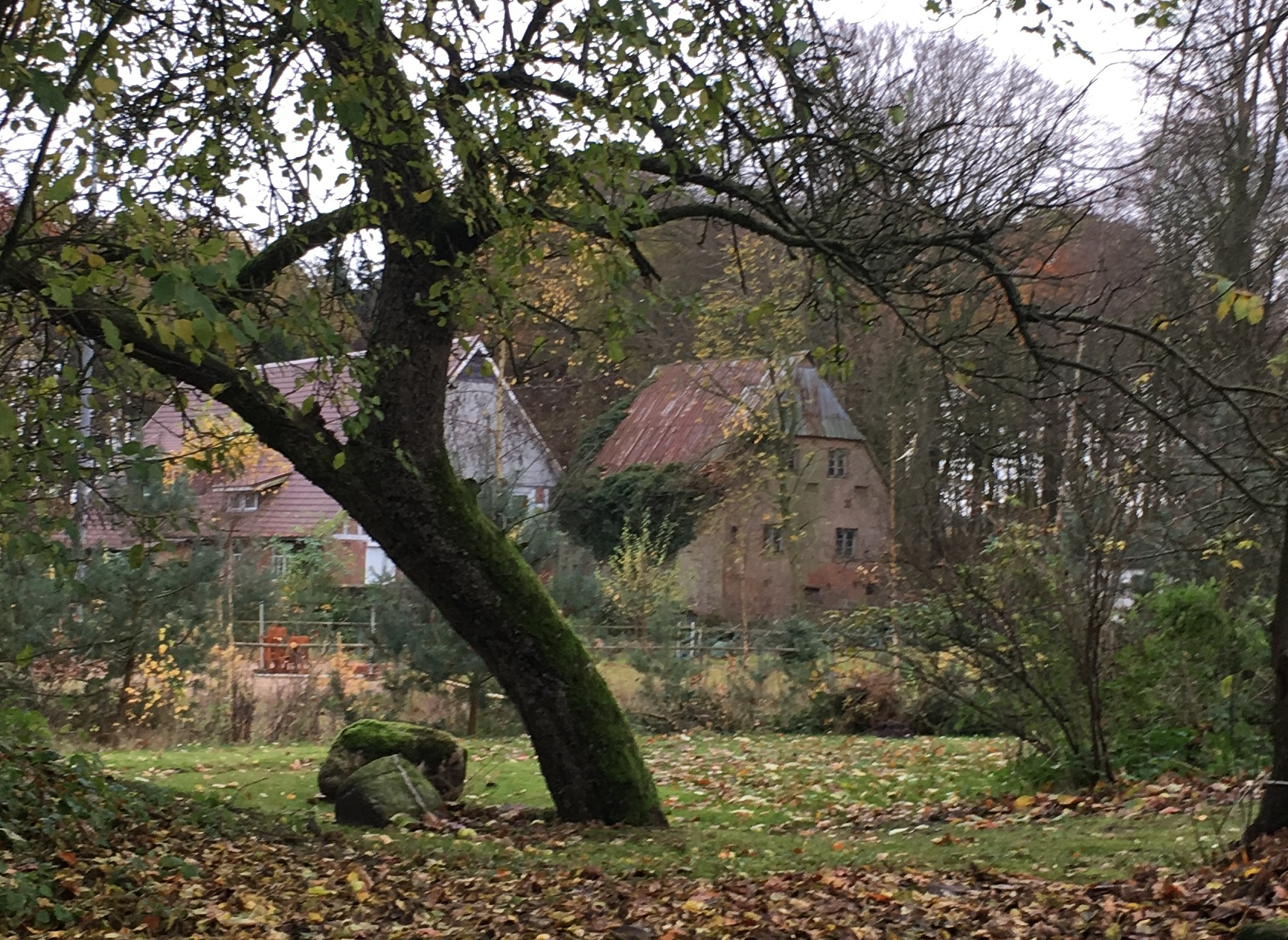 de Pulvermöhl, Heeßel, Landkreis Cuxhoben